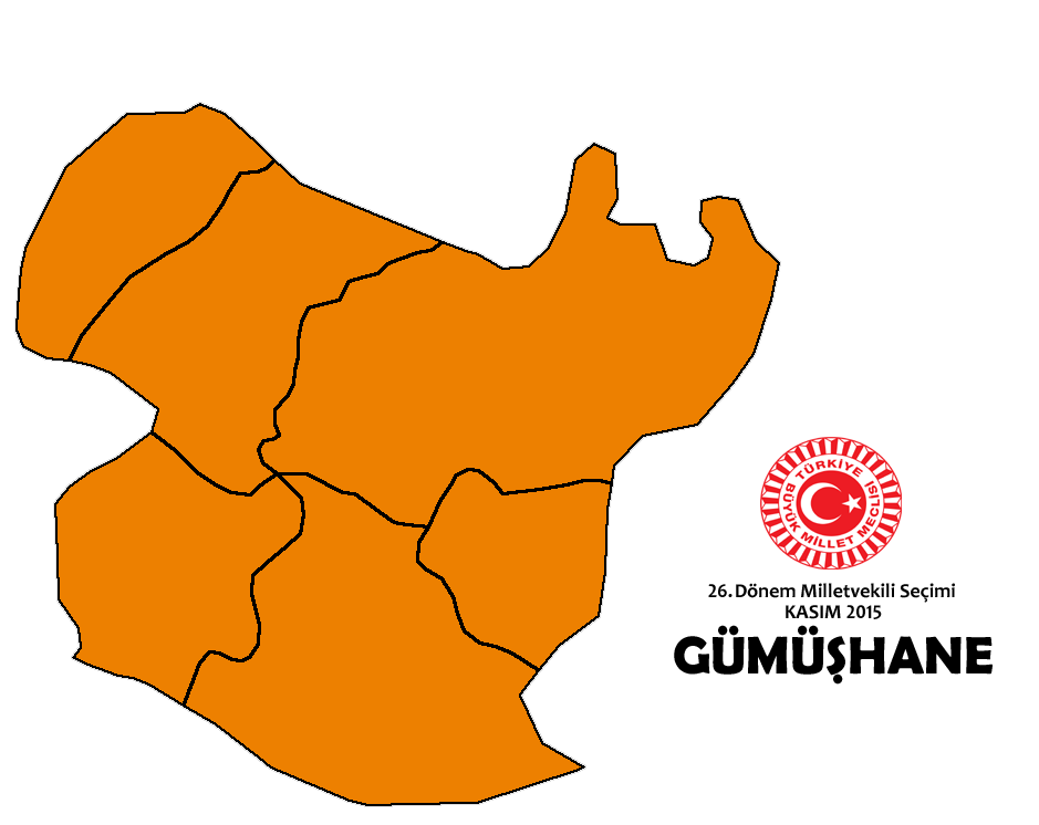 Kasım 2015 seçimleri